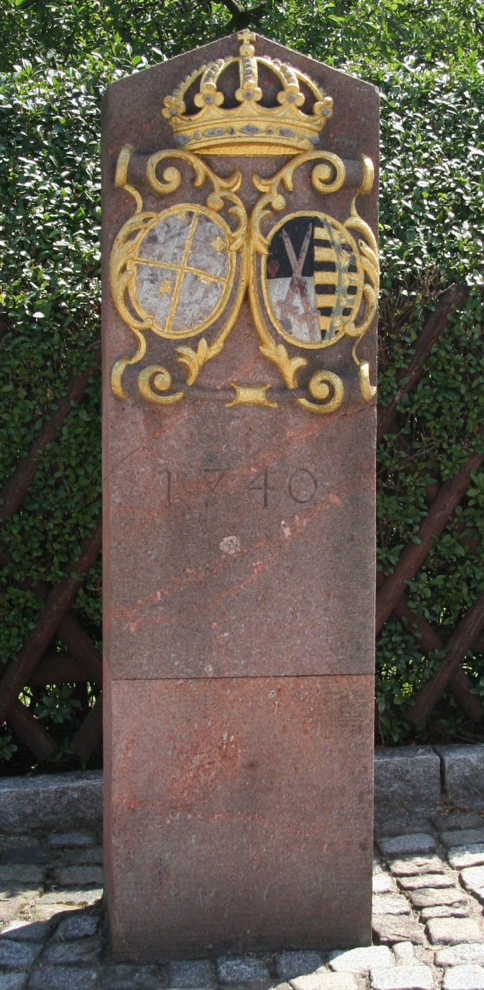 Säule in Altmörbitz